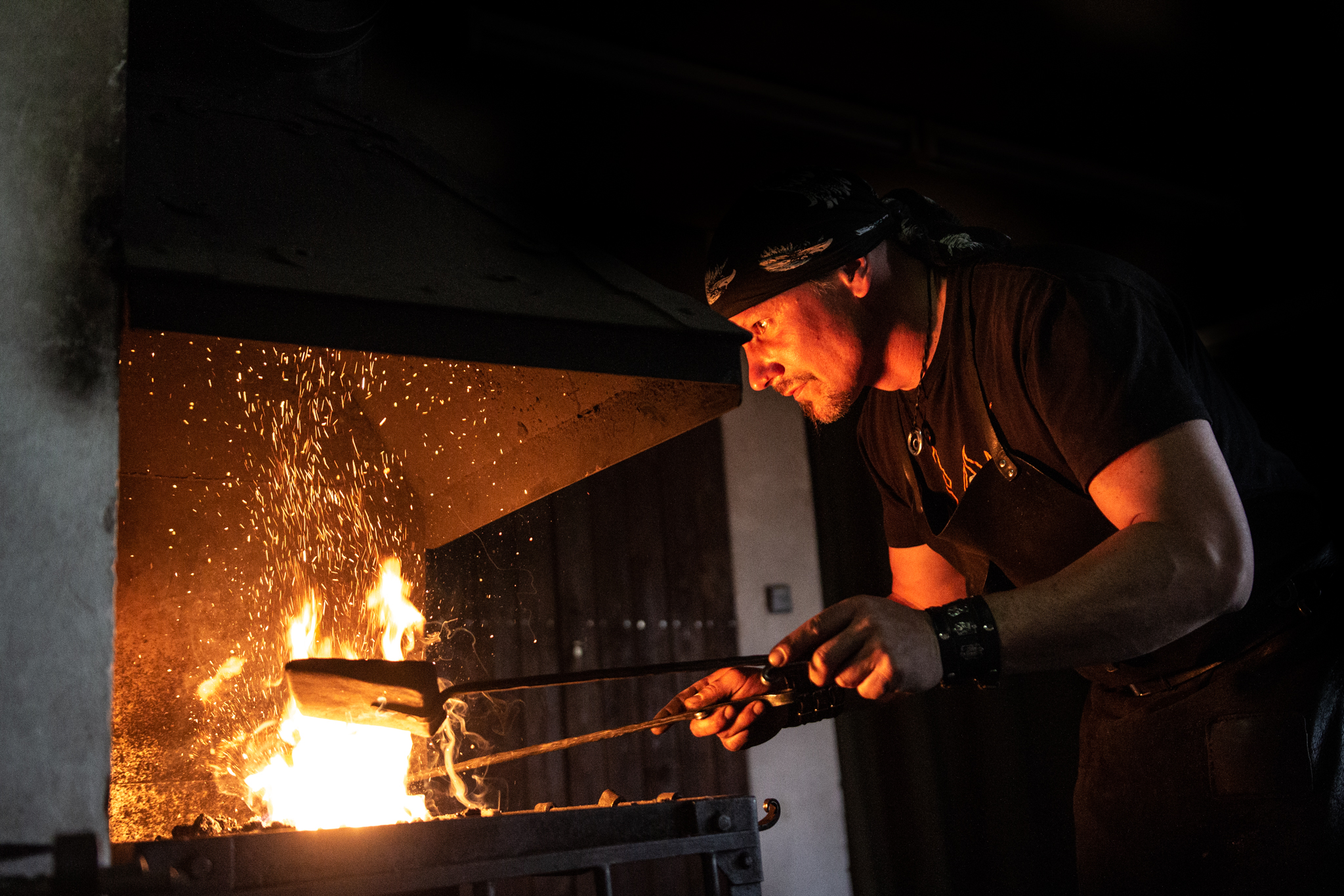 přikládání do kovářské výhně. Příprava před kováním umělecké skulptury